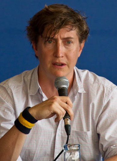 2013-09-02 festival deauville-56.jpg